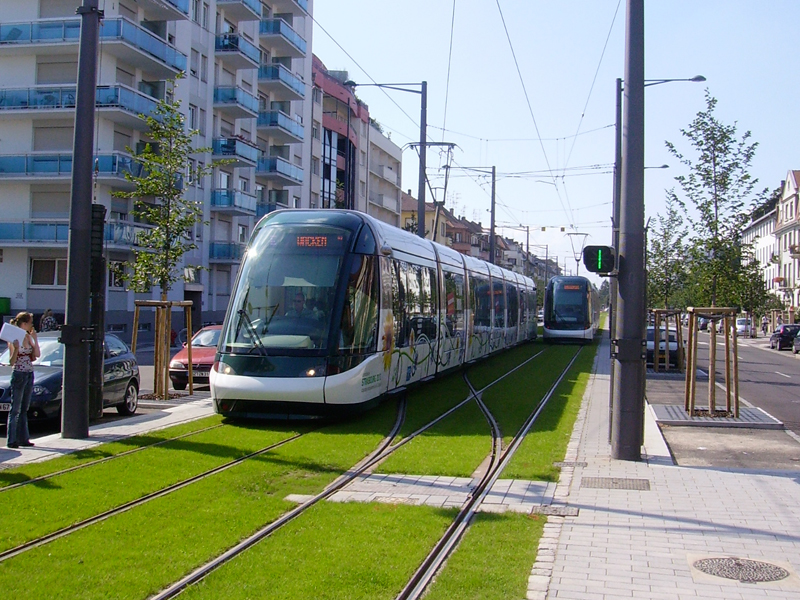 Nouvelles rames du tram de Strasbourg circulant sur la nouvelle ligne E avenue Jean-Jaurès (ouverte depuis le 25 août 2007).